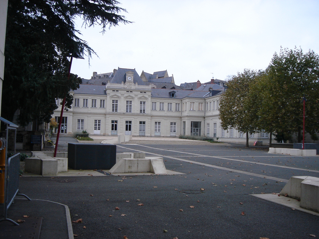 ENSAM à Angers dans l'abbaye du Ronceray